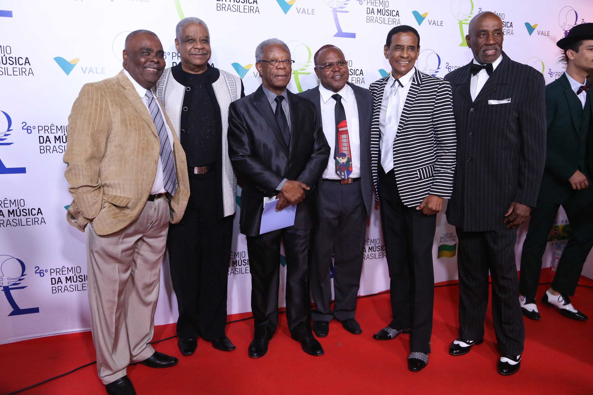 Milton Goncalves e Fundo de Quintal - 26° Prêmio da Música Brasileira 2015, no Theatro Municipal, no Centro do Rio de Janeiro/RJ. (10/06/15) Foto: Roberto Filho/Divulgacão